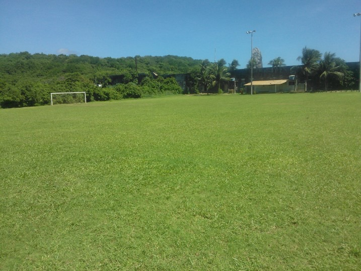 Gramado do Campo Pianão